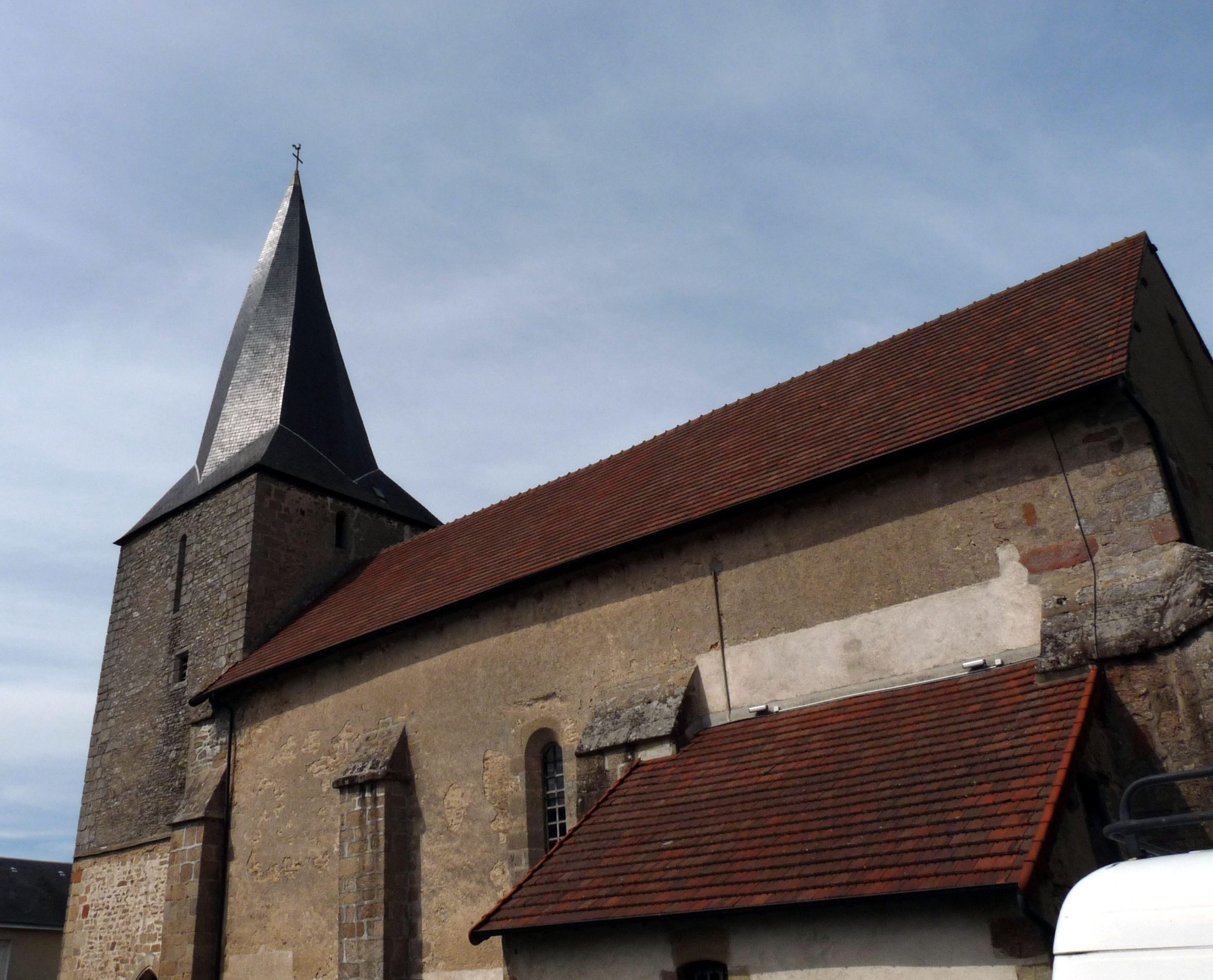 église de Naillat en Creuse avec son clocher tors